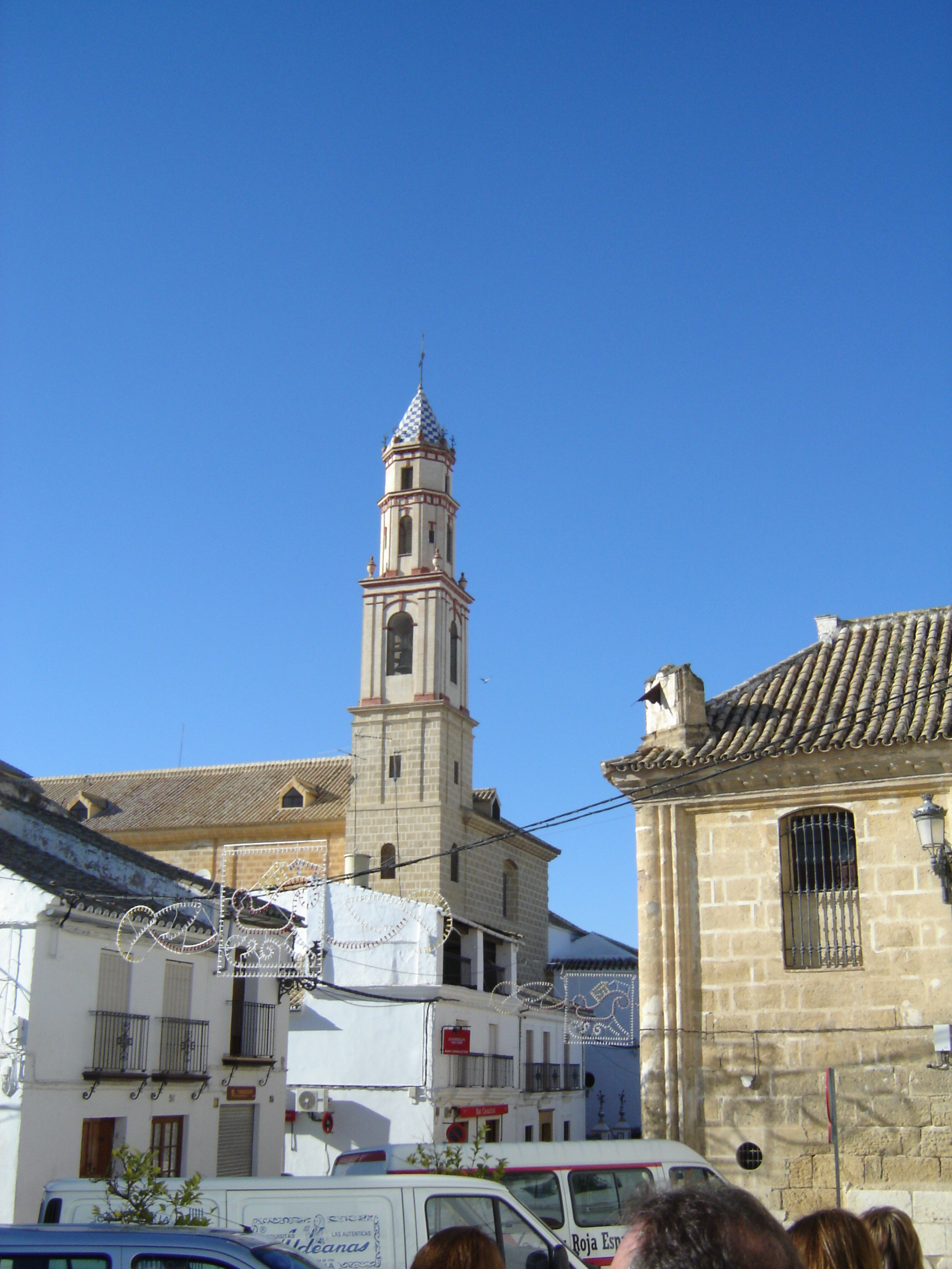 Torre de la Iglesia de Nuestra Señora de la Victoria